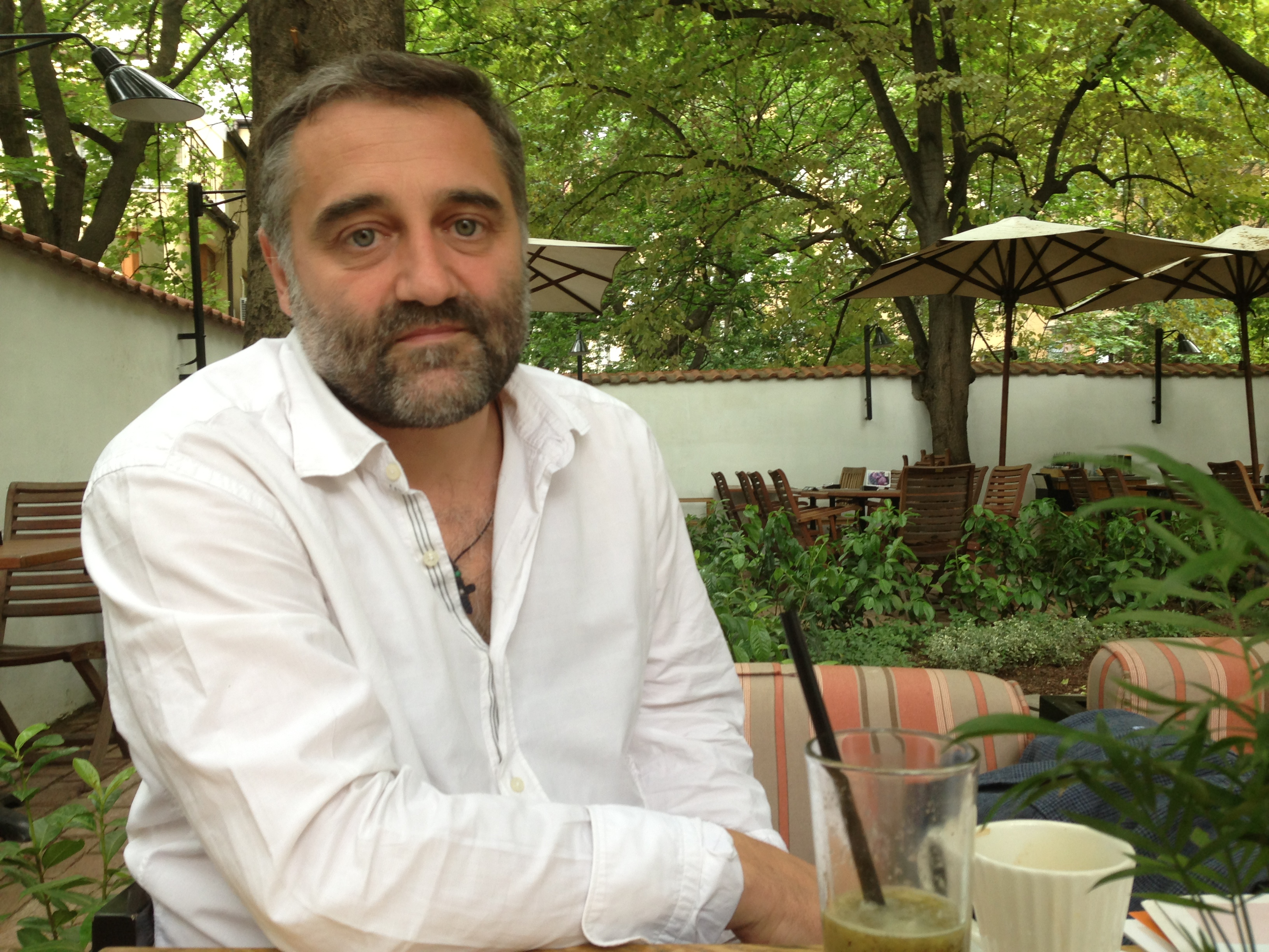 Александър Секулов - писател